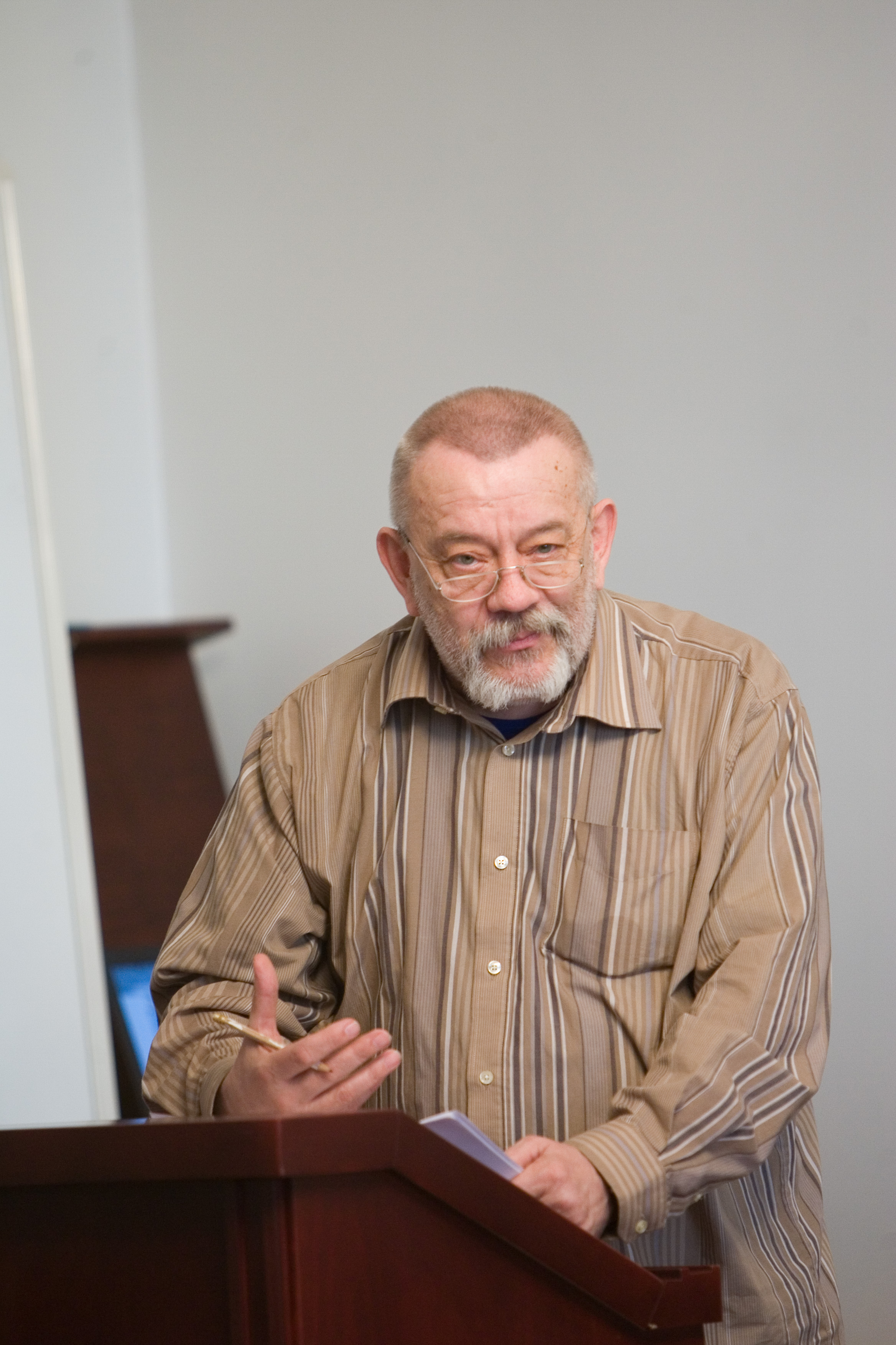 Tartu Ülikooli 375. aastapäeva korraldajate koosolek nõukogu saalis 27. märtsil 2007. Kulminatsiooniürituste korraldaja Kalju Komissarov.